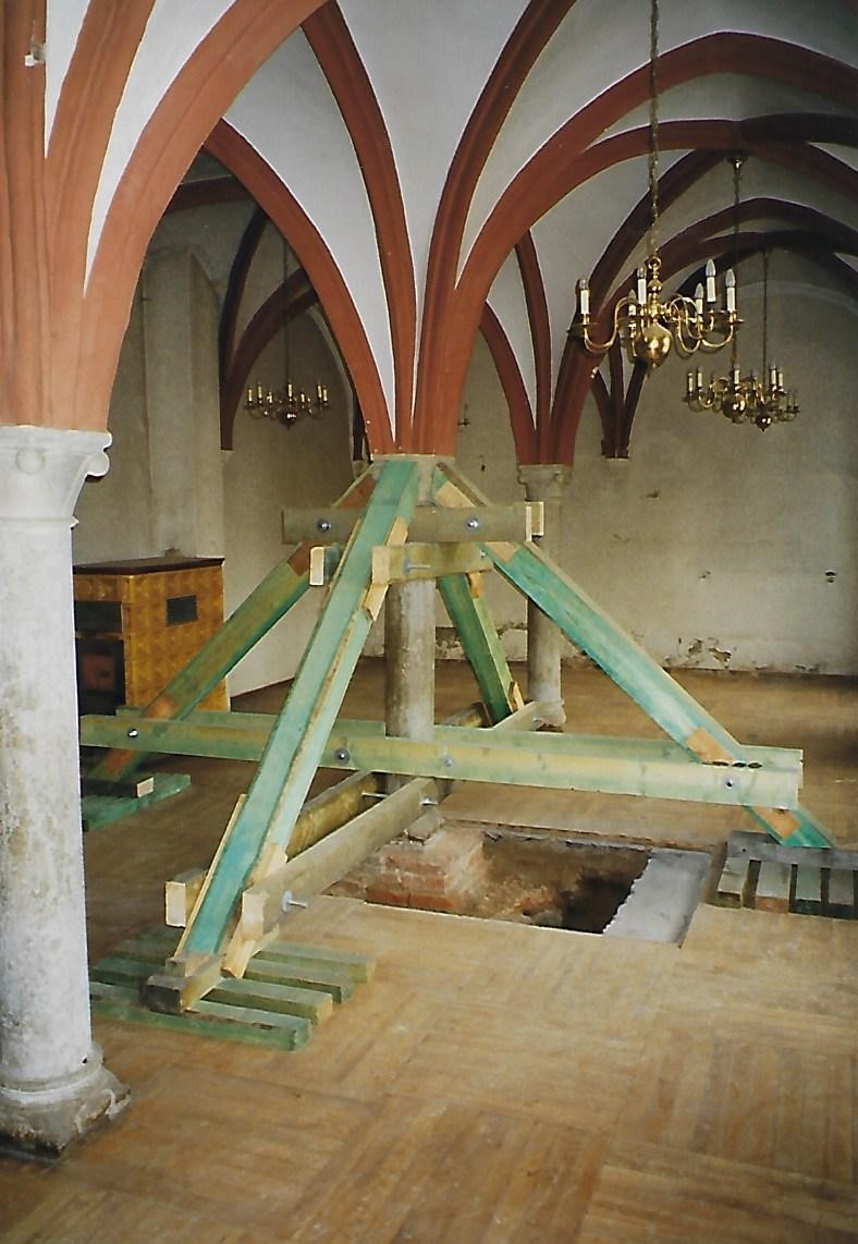 Bauzeitliche Abfangung einer Säule im Refektorium des Klosters Dobbertin. Sie erfolgte bei der Fundamentverstärkung für eine höhere Deckenlastauslegung durch den darüber befindlichen Schulbetrieb.